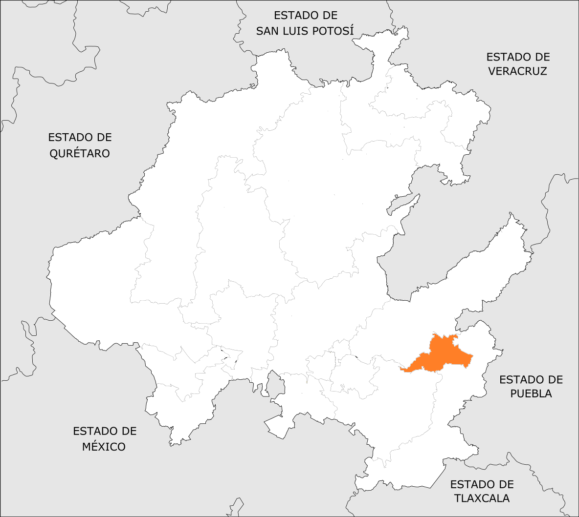 Distrito Electoral Local de Hidalgo 11